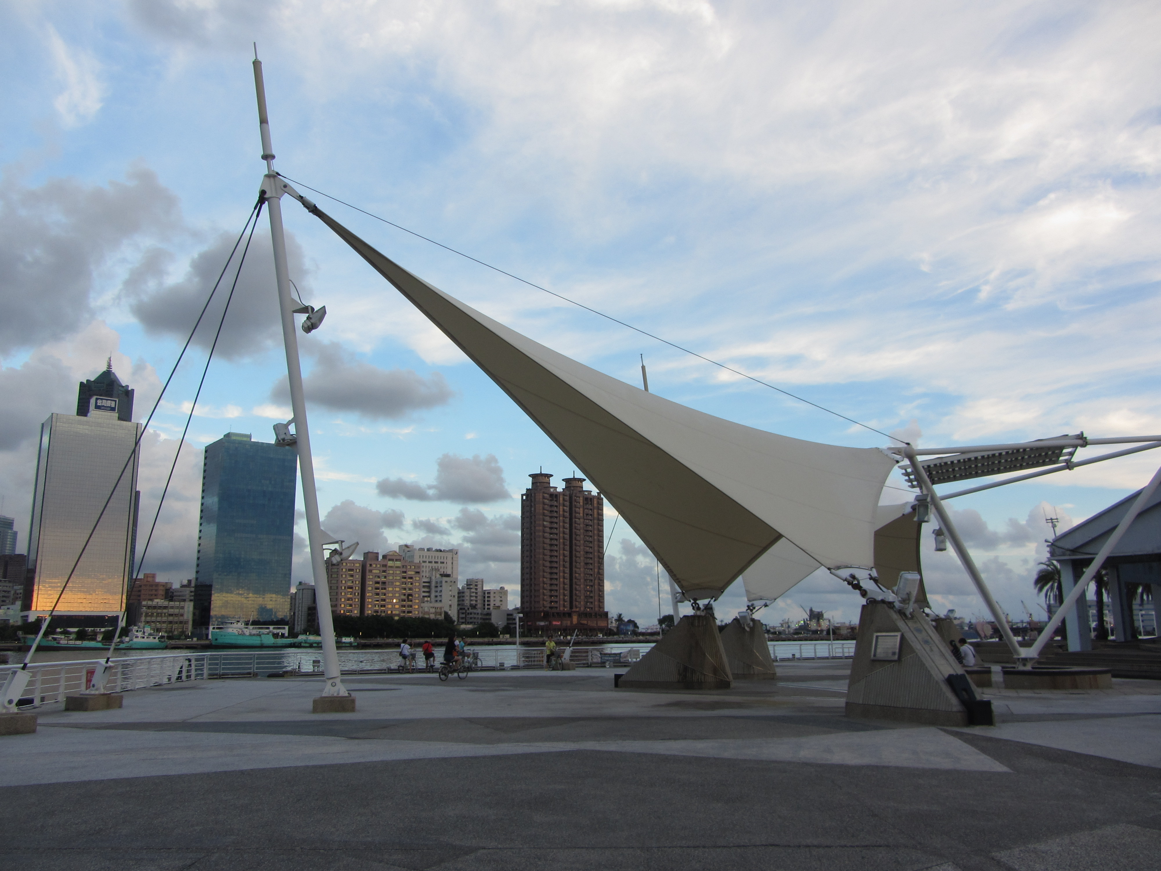 高雄市真愛碼頭風帆裝置藝術